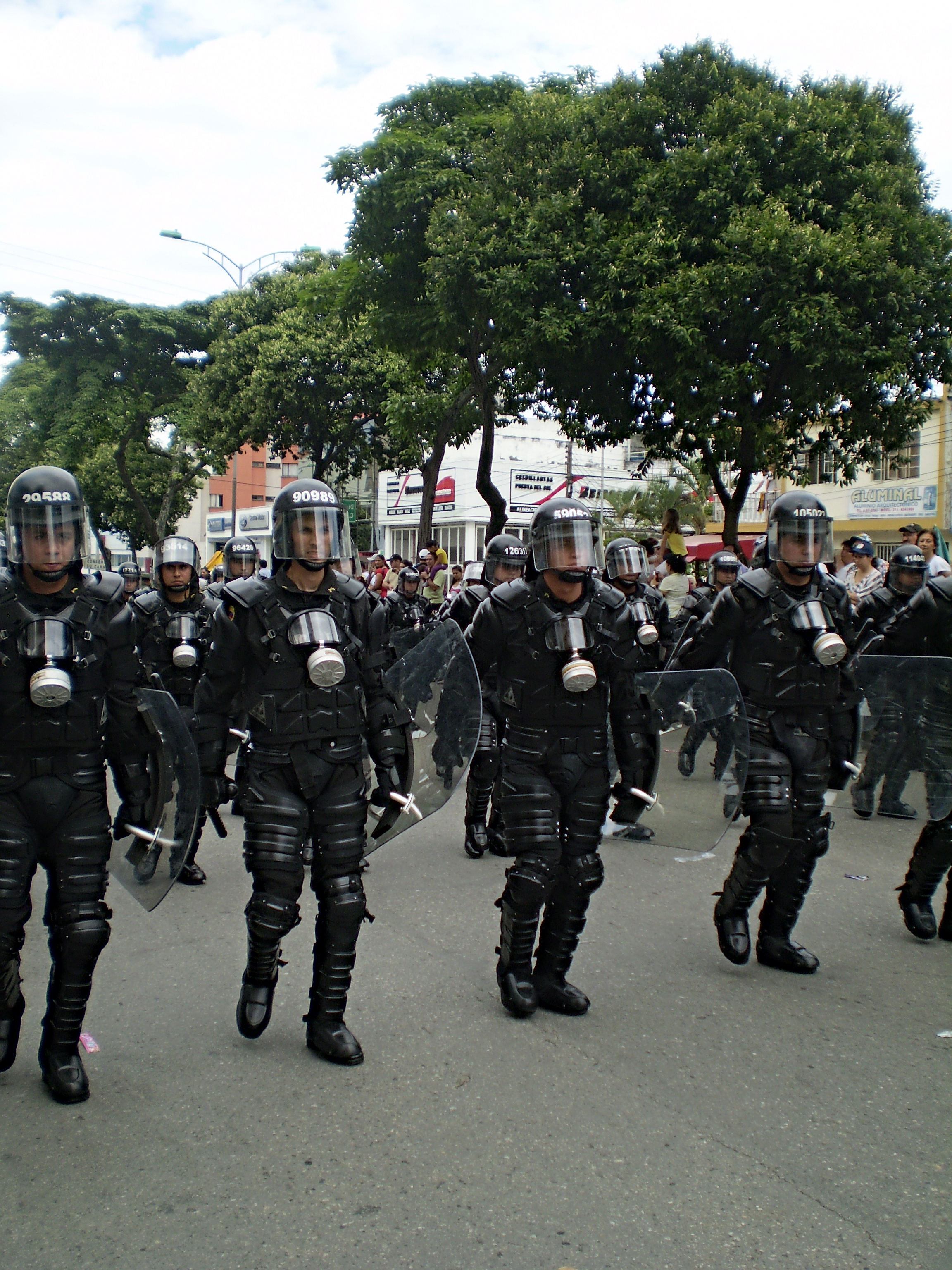 Grupo ESMAD de la Policía Metropolitana de Bucaramanga en el desfile del 20 de Julio de 2011